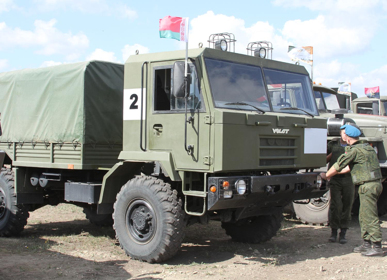 Автомобиль МЗКТ-500200. На площадке конкурса "Мастера артиллерийского огня". Конкурс в рамках "Первых международных армейских игр".